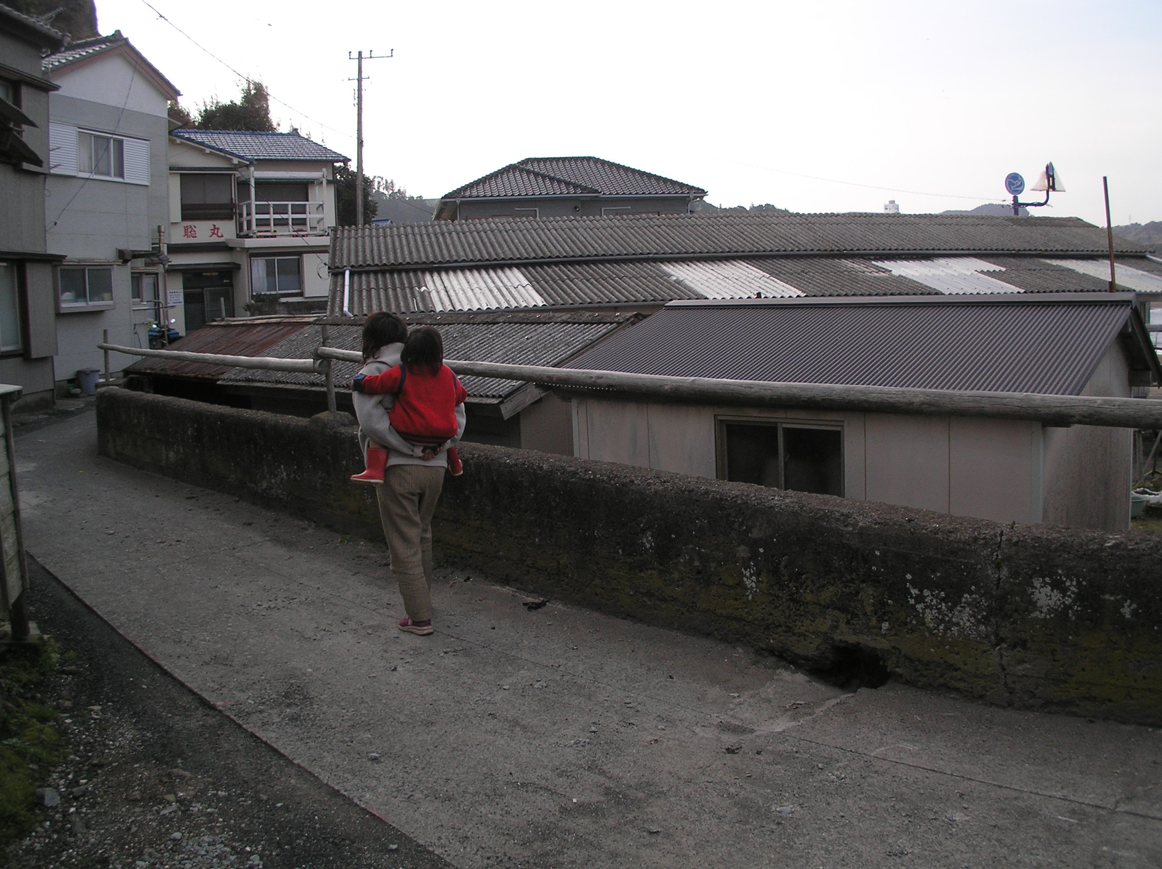 ねじ式の絵によく似た太海の海岸沿いの小道。 ～photo by Autumn Snake 【おぉたむ すねィく探検隊】写真部門 担当 大原佳苗